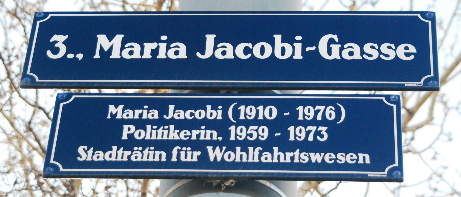 Maria Jacobi-Gasse in Wien-Landstraße